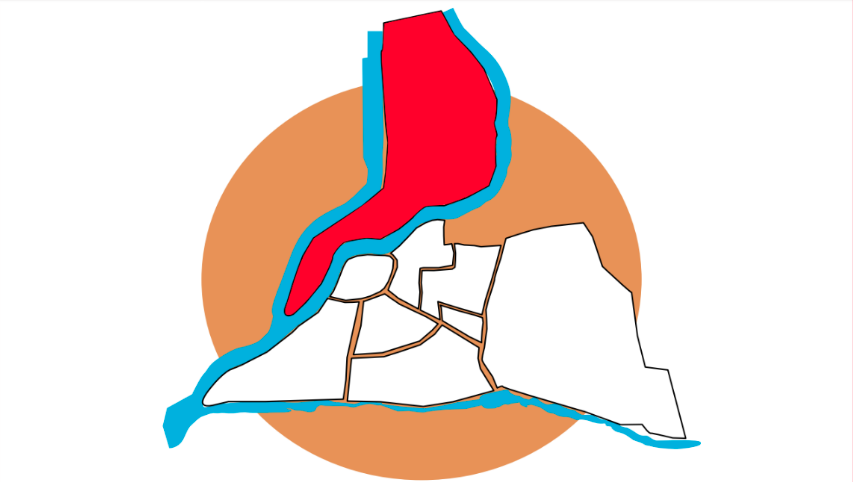 Emplacement du quartier de Barthelasse-Piot sur la carte d'Avignon.